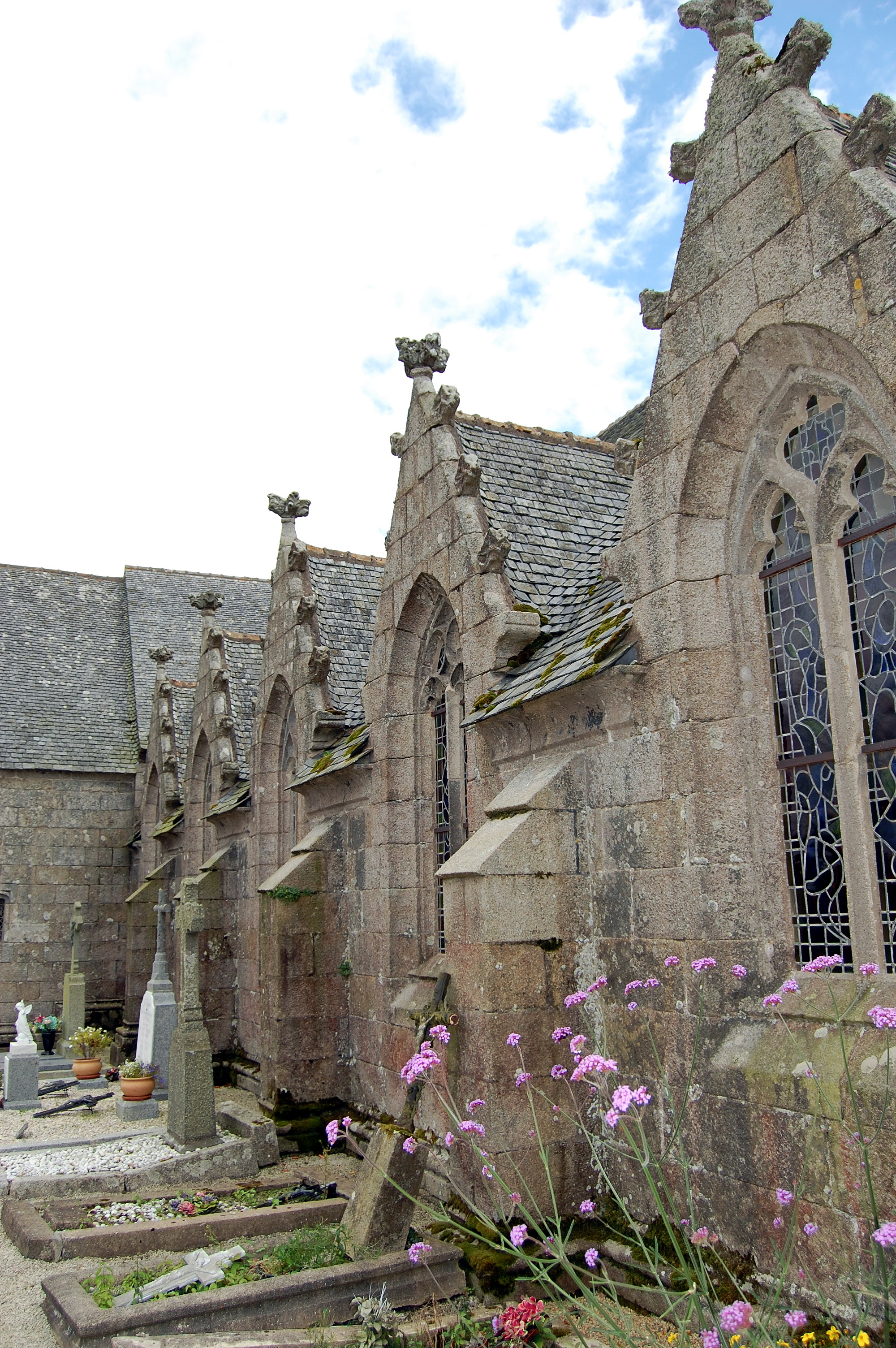 Enclos paroissial de Trédrez, France.